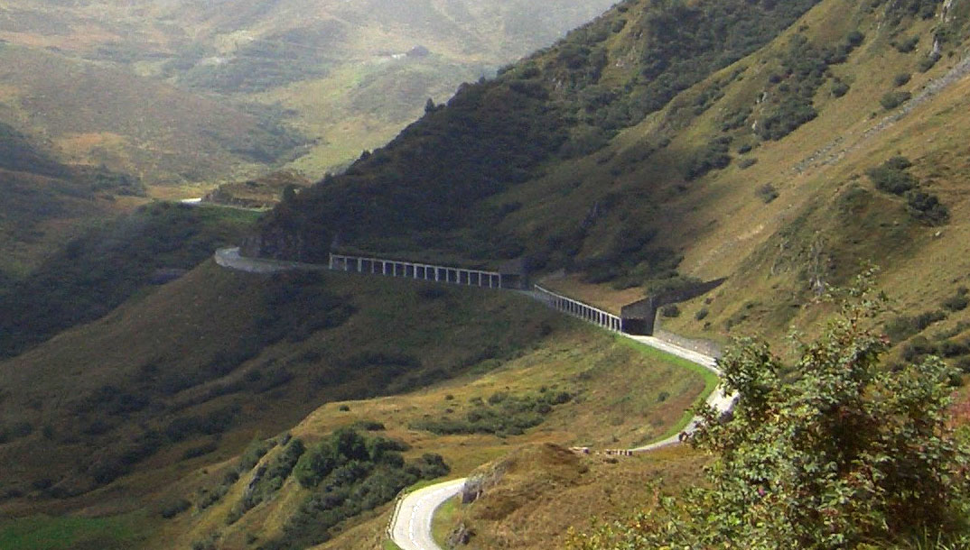 Galeriestraße am Schweizer Oberalppass